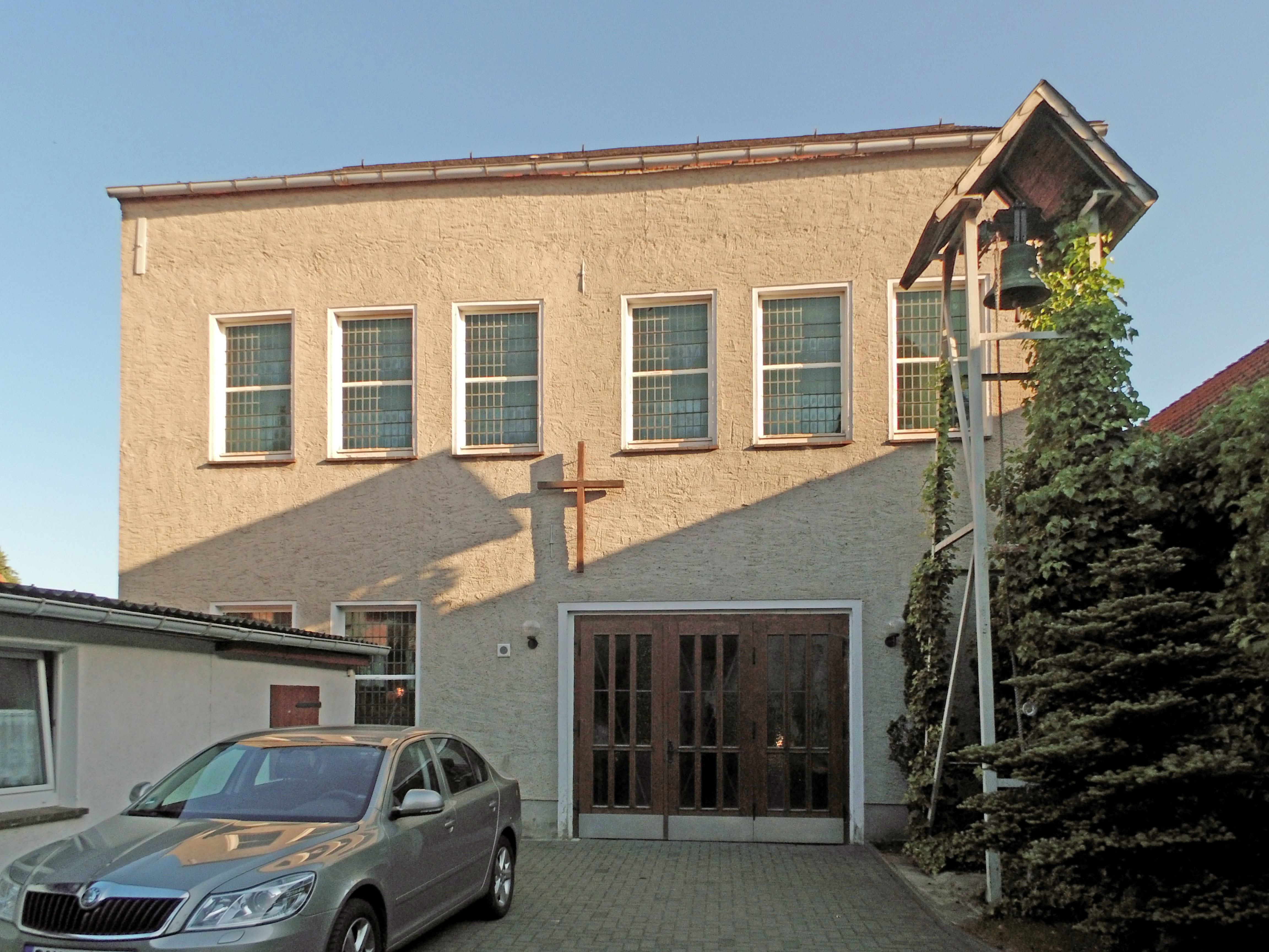 Katholische Kapelle St. Antonius von Padua in Dähre (Sachsen-Anhalt)